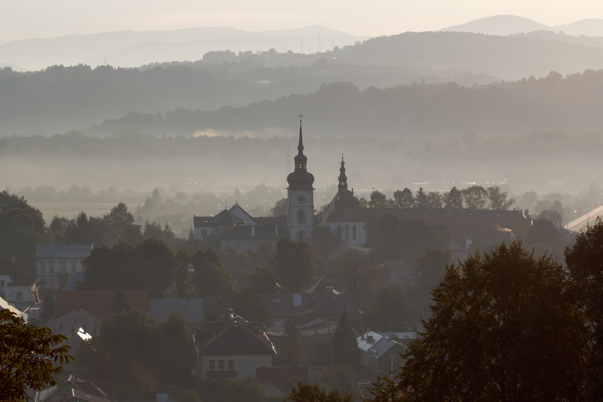 Założenie urbanistyczne miasta Stary Sącz, Stary Sącz rej. nr 519.